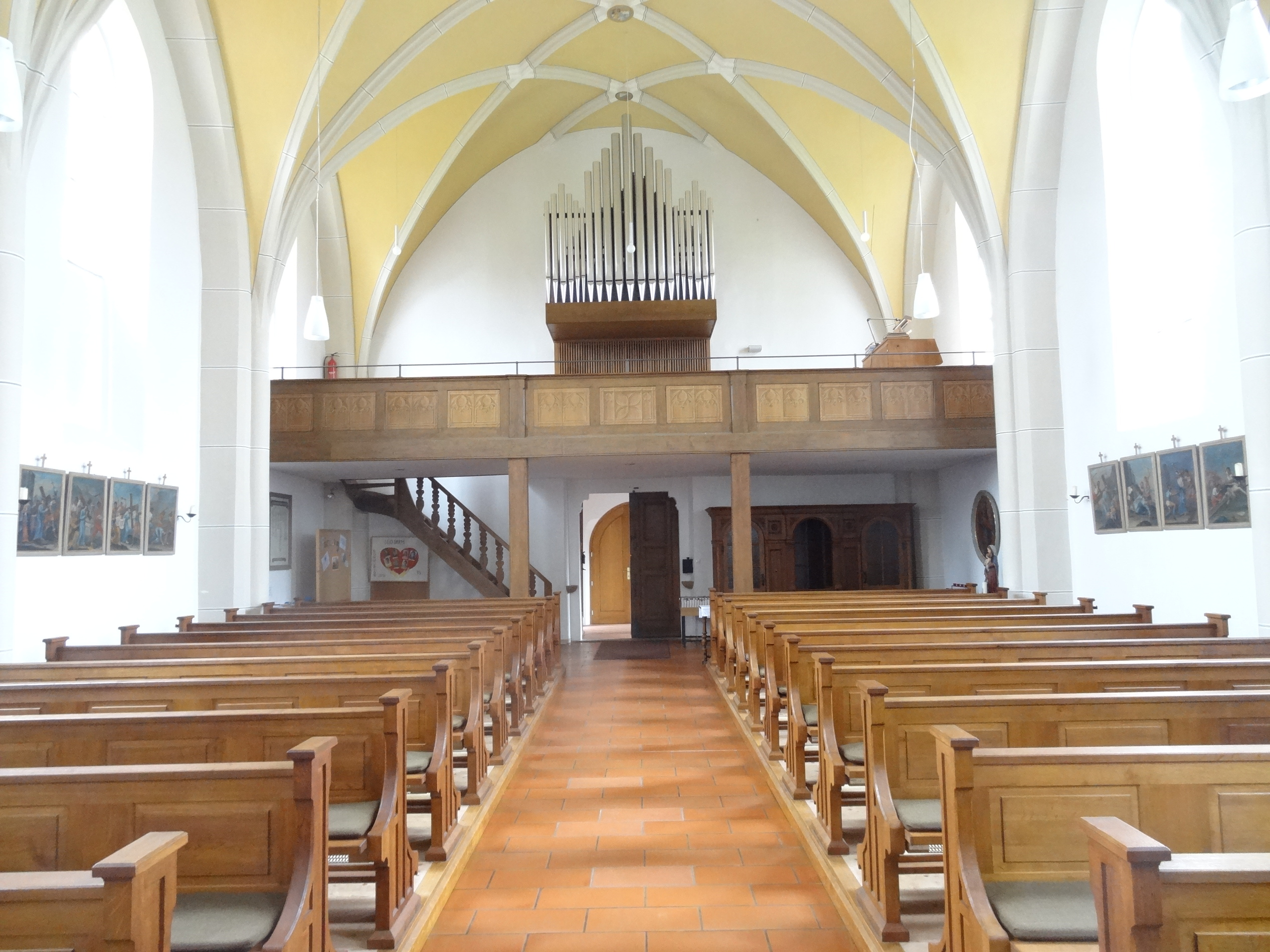 Rückblick auf Westempore und -portal im Langhaus der Pfarrkirche St. Kastulus in Vilsheim (Lkr. Landshut, Bayern)